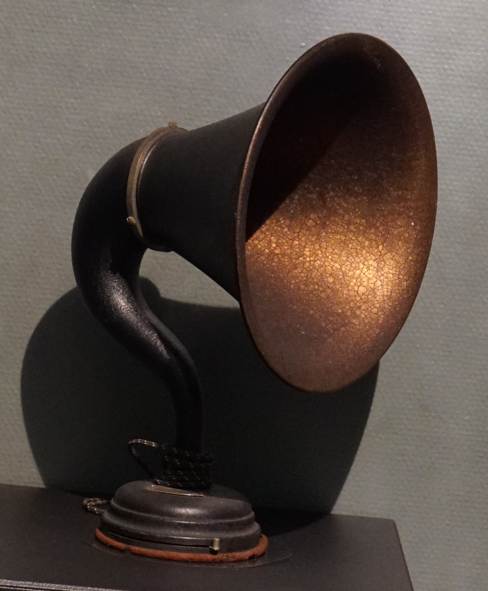 présenté lors de l'Exposition Maurice Pierrat le goût de l'exotisme. Pret de la cinémathèque.